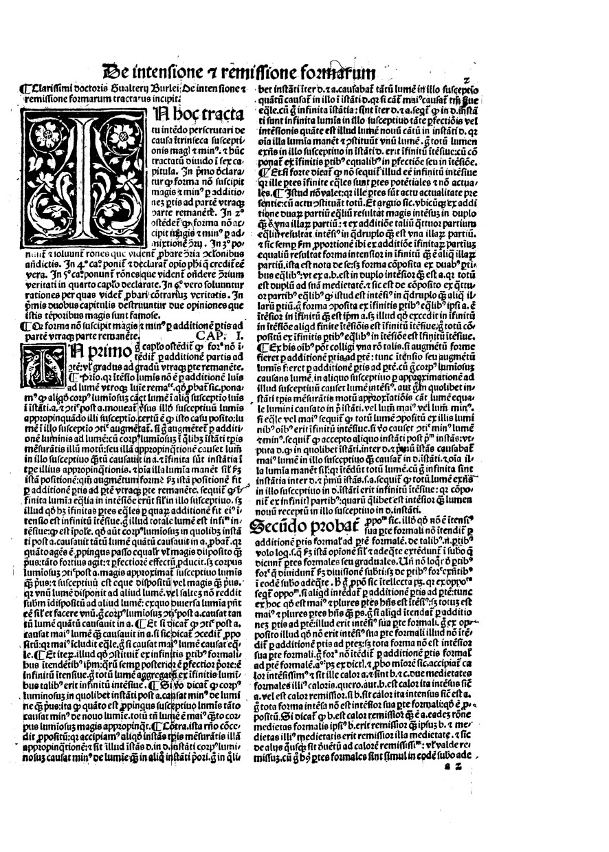 Burleus De intensione & remissione formarum ; Jacobus de forliuio de intensione & remissione formarum ; Tractatus proportionum Alberti de saxonia. - Venetijs : mandato & expensis nobilis viri domini Octauiani Scoti [...] Per Bonetum Locatellum Bergomensem., 1496. - 45, [1] c. - Segn.: a-g6 h4. - ISTC ib01314000 ; Goff B1314; HC 4141 (incl H 587); Klebs 233.1; Pell 3081; CIBN B-924; Hillard 522; Parguez 280; Zehnacker 593; Polain(B) 934; IGI 2271; IBP 1334; IBPort 429; IDL(Suppl) 1080a; CCIR B-136; IBE 1340; Sander 1471; Hubay(Ottobeuren) 107; Günt(L) 3397; Walsh 2329; Rhodes(Oxford Colleges) 469; Bod-inc B-606; Sheppard 4222; Pr 5073; BMC XII 31; BSB-Ink B-990; GW 5780 .